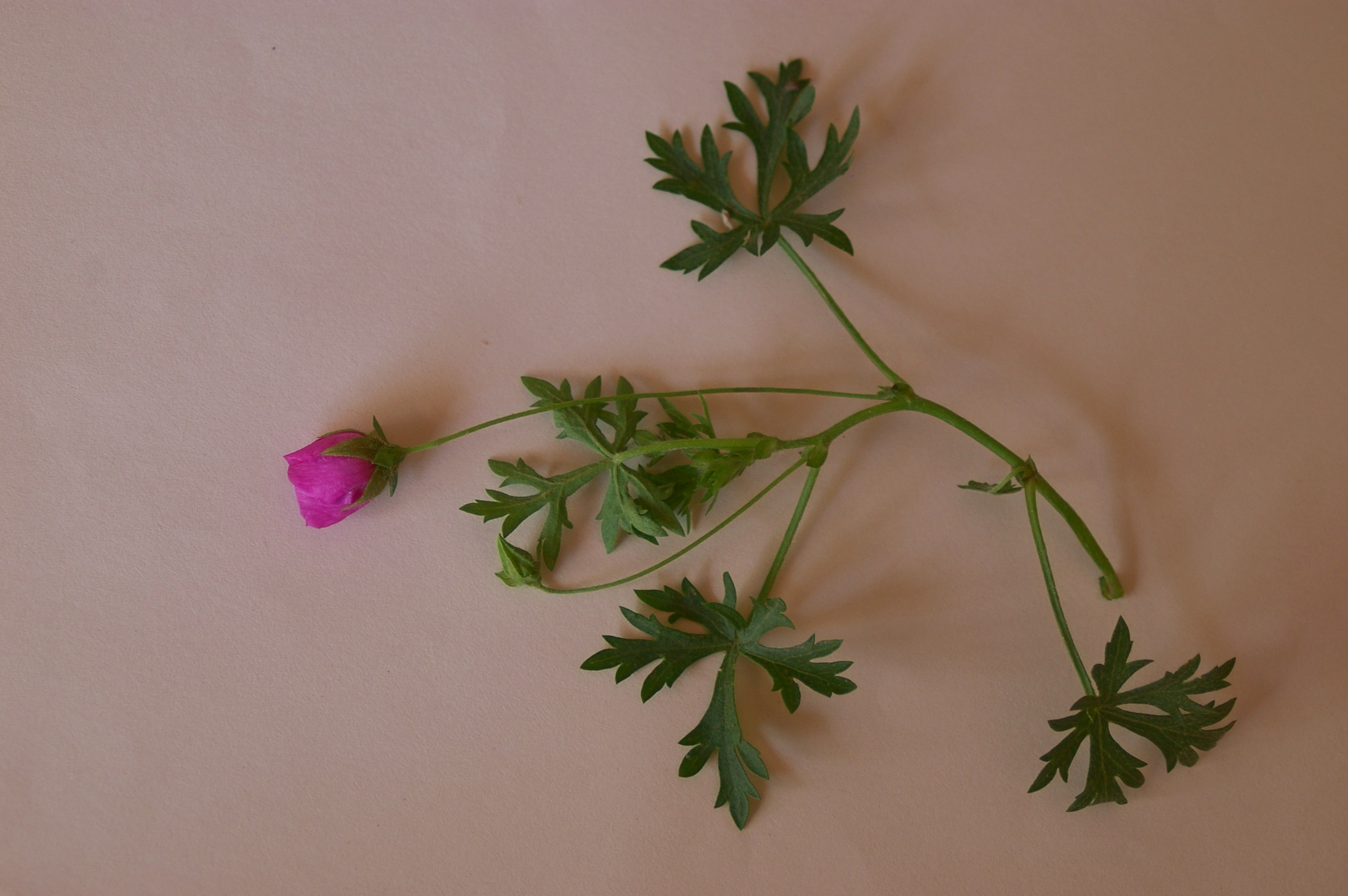 tallo, hojas y flor de Modiolastrum gilliesii (Malvavisco)